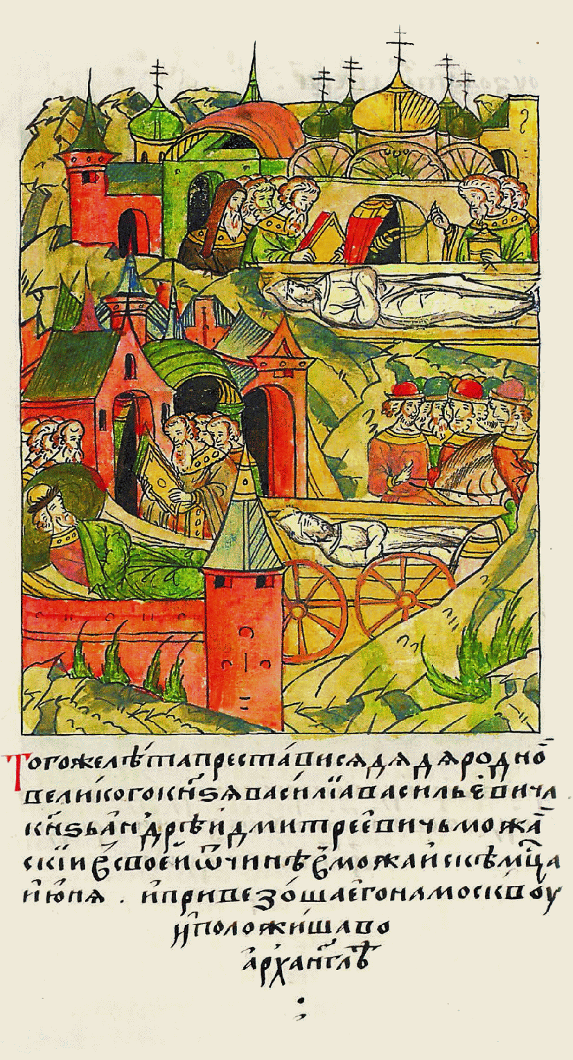 В том же году скончался родной дядя великого князя Васи- лия Васильевича князь Андрей Дмитриевич Можайский в своей отчине Можайске месяца июня, и при- везли его в Москву, и положили в церкви архангела Михаила.